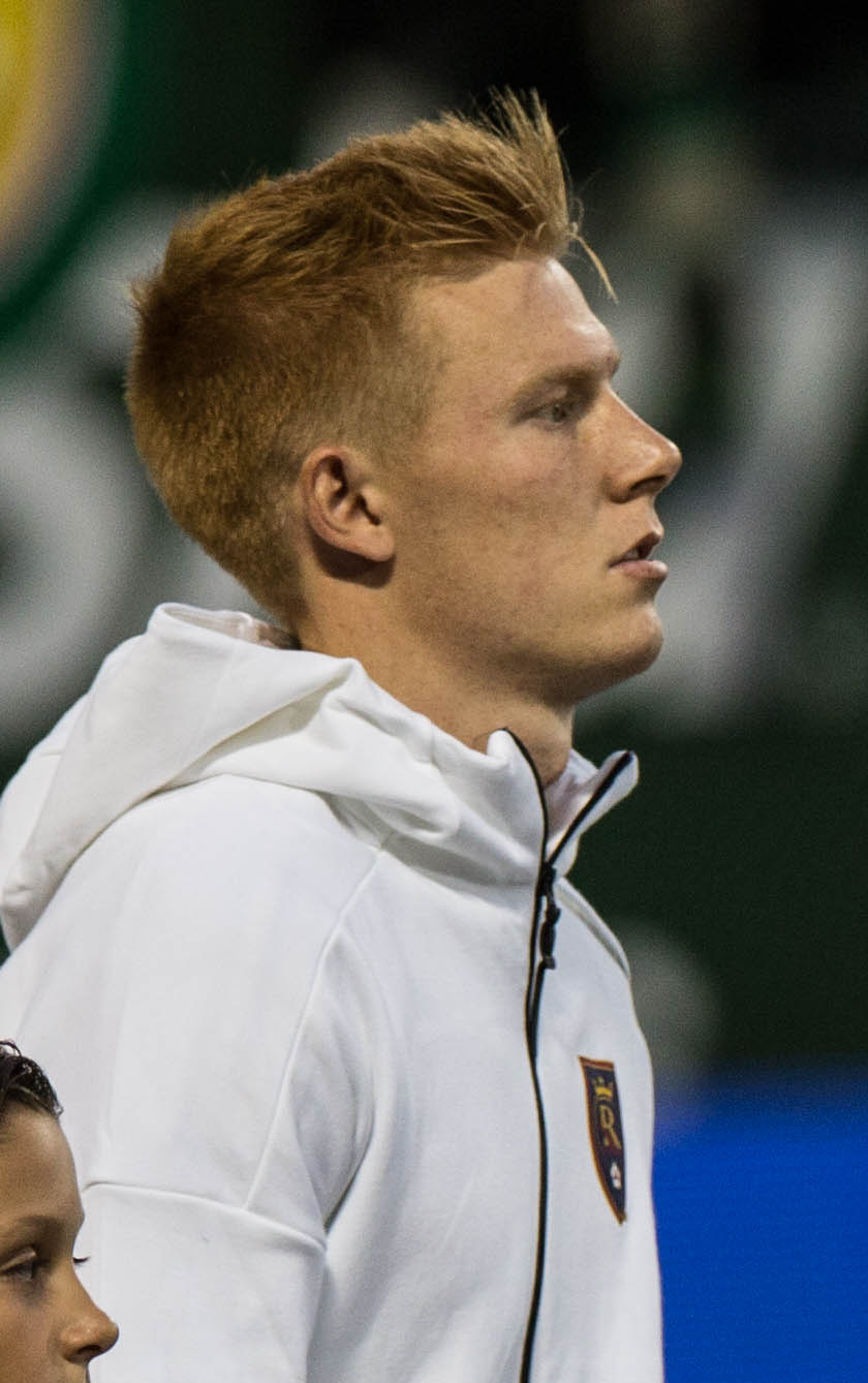 N42A3442.jpg